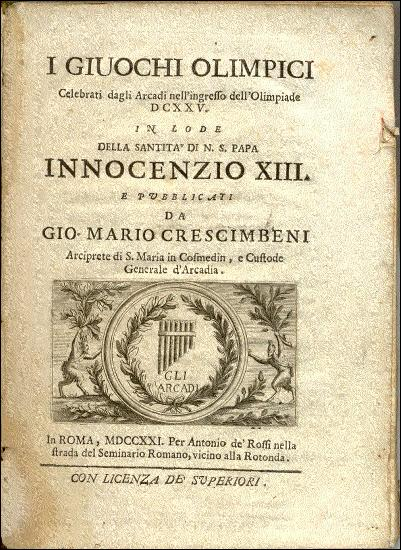 Giovanni Mario Crescimbeni, Italian writer (title page)